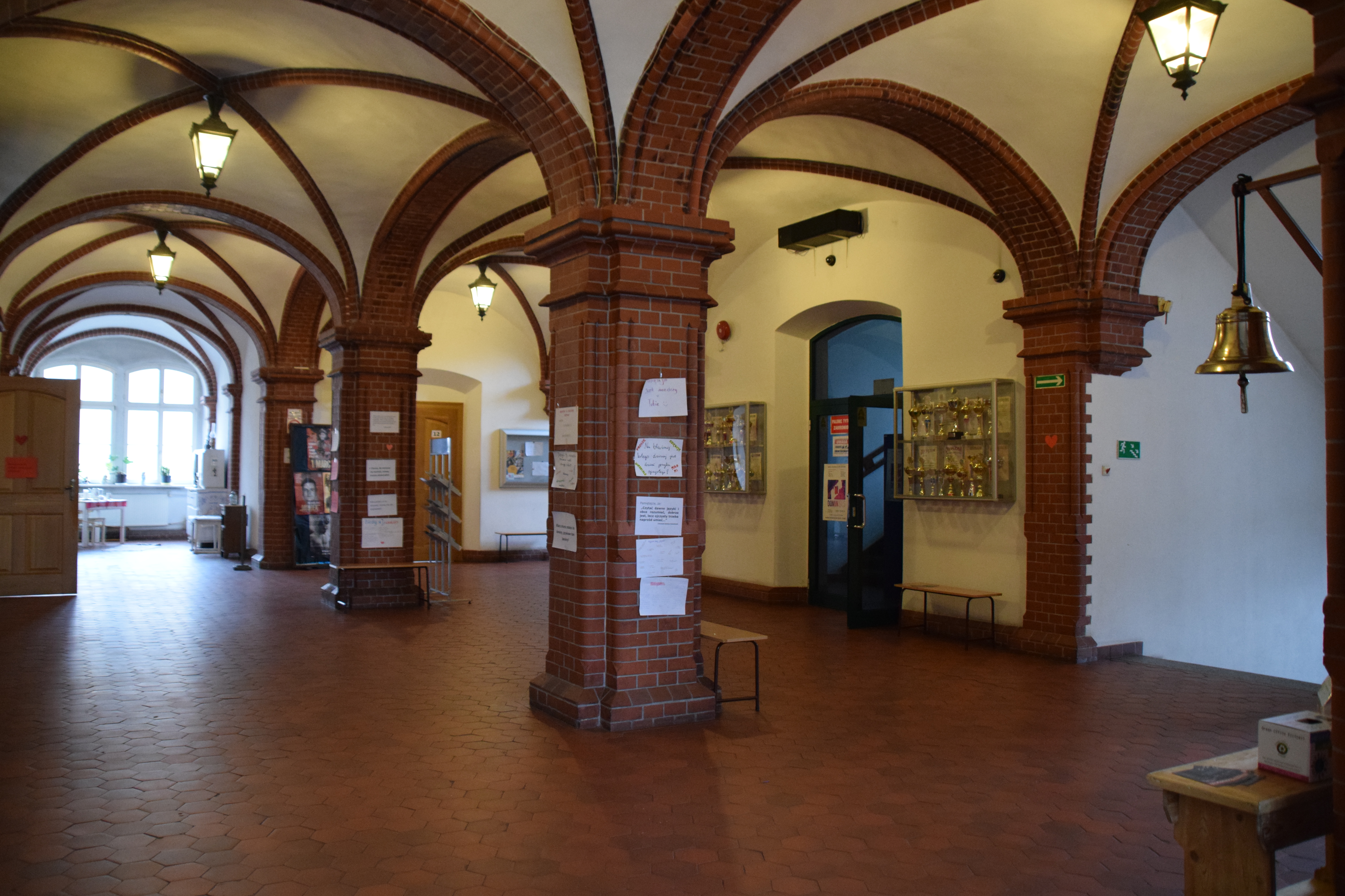 Korytarz w VI LO w Katowicach-Szopienicac